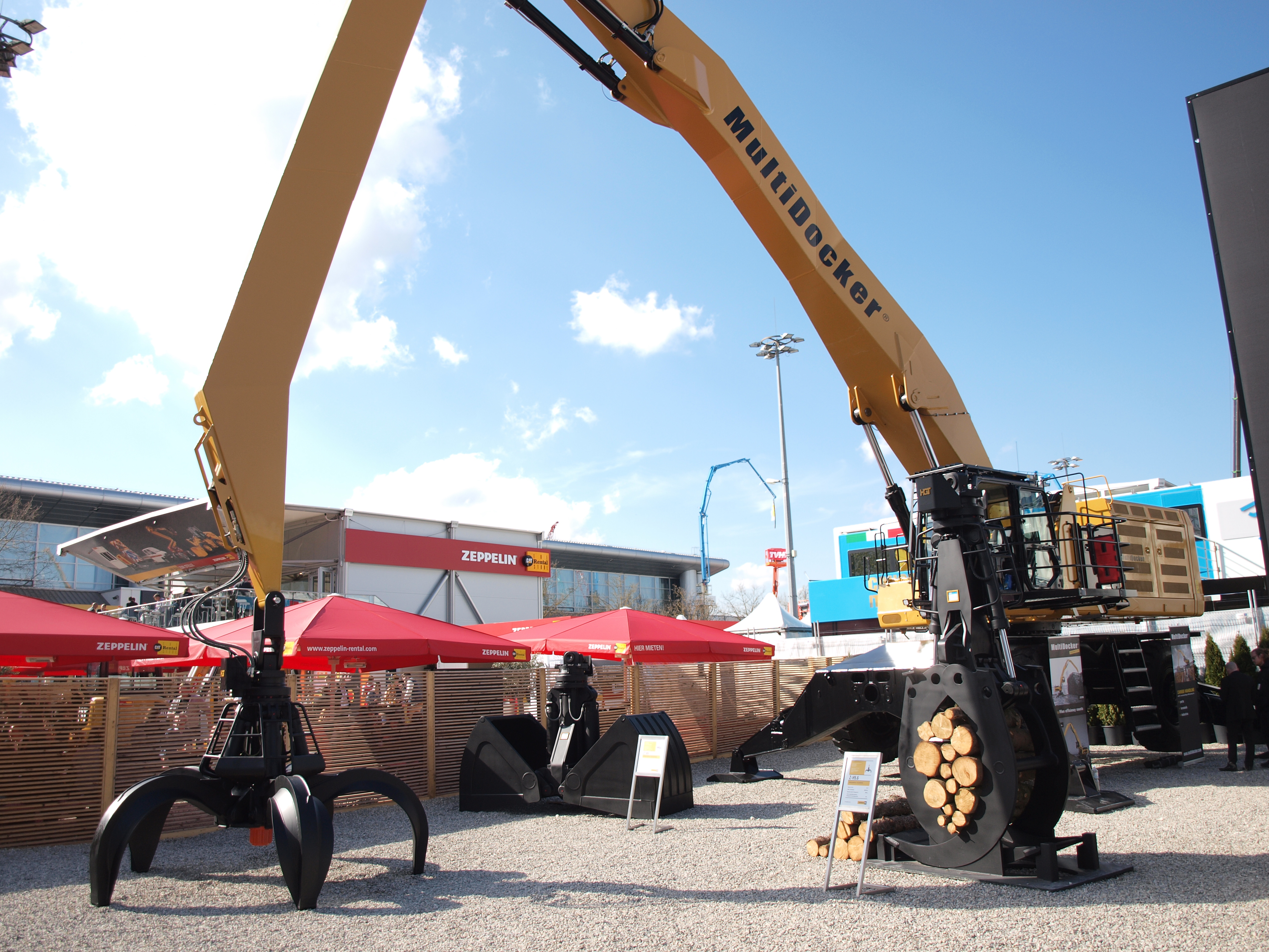 Bagger mit Vierbacken-Holzgreifer sowie abgestelltem Zweibacken-Holzgreifer